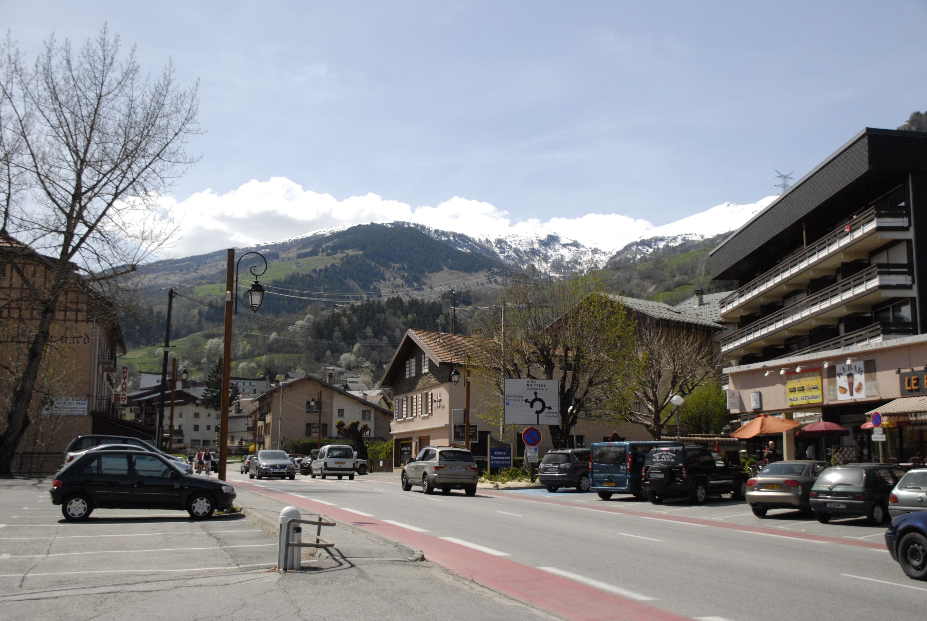 Bourg-Saint-Maurice (France)